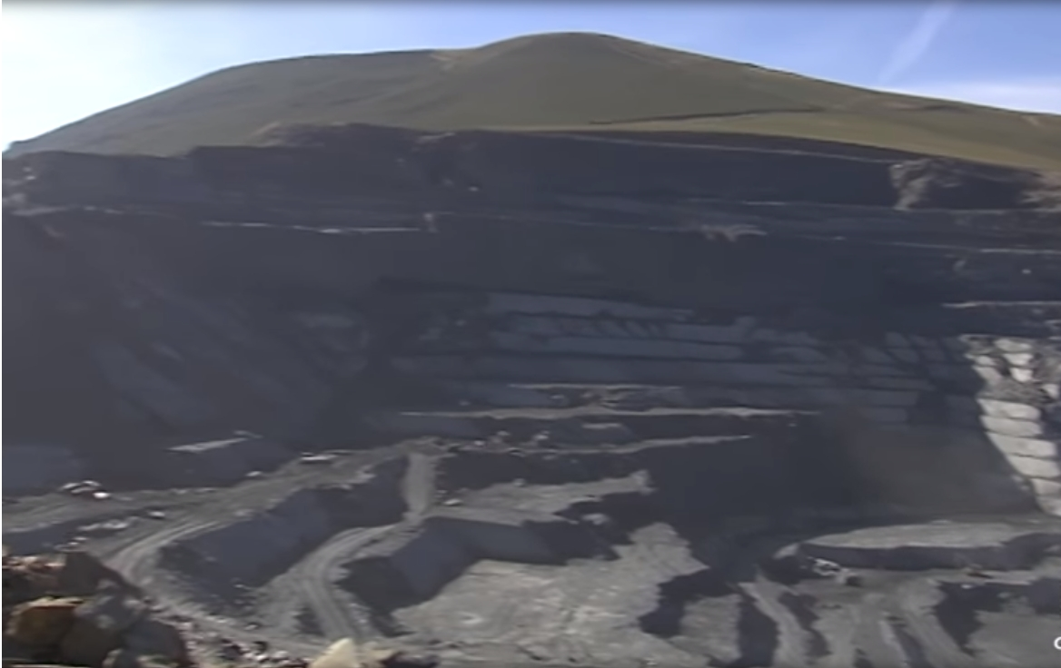 Pilar del Olmo visita la cantera de pizarra más grande del mundo en San Pedro de Trones, León. Mina de Las Arcas, operada por Cupa Group.